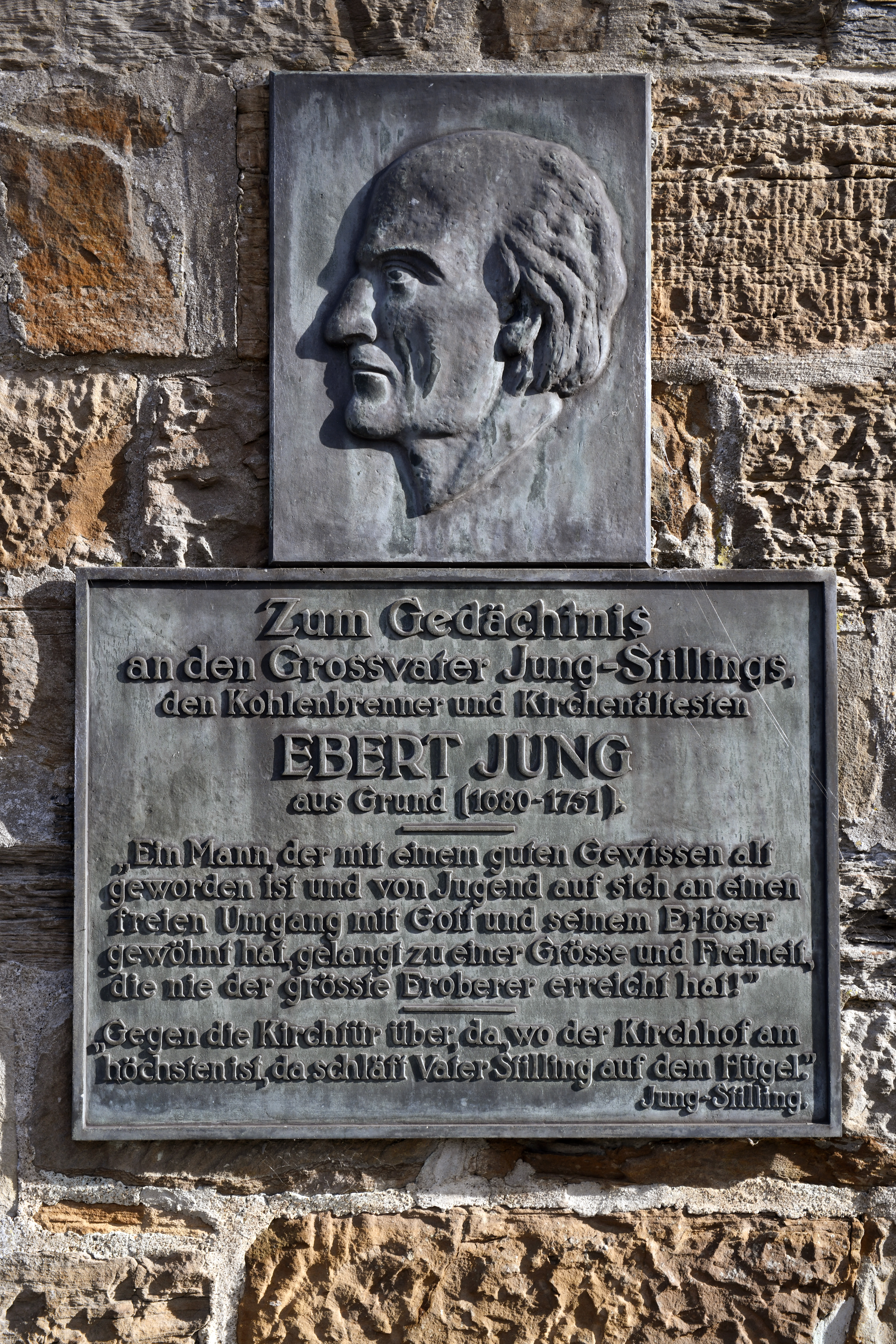 Gedenktafel von Johann Heinrich Jung-Stilling für seinen Großvater Johann Eberhard Jung in der Kirche Hilchenbach